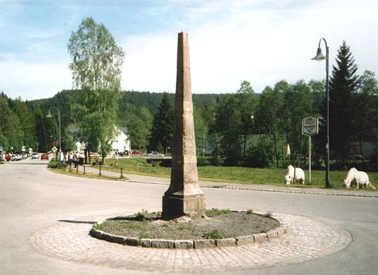 Kursächsische Ganzmeilensäule von 1725 in Erlabrunn, Mai 2003